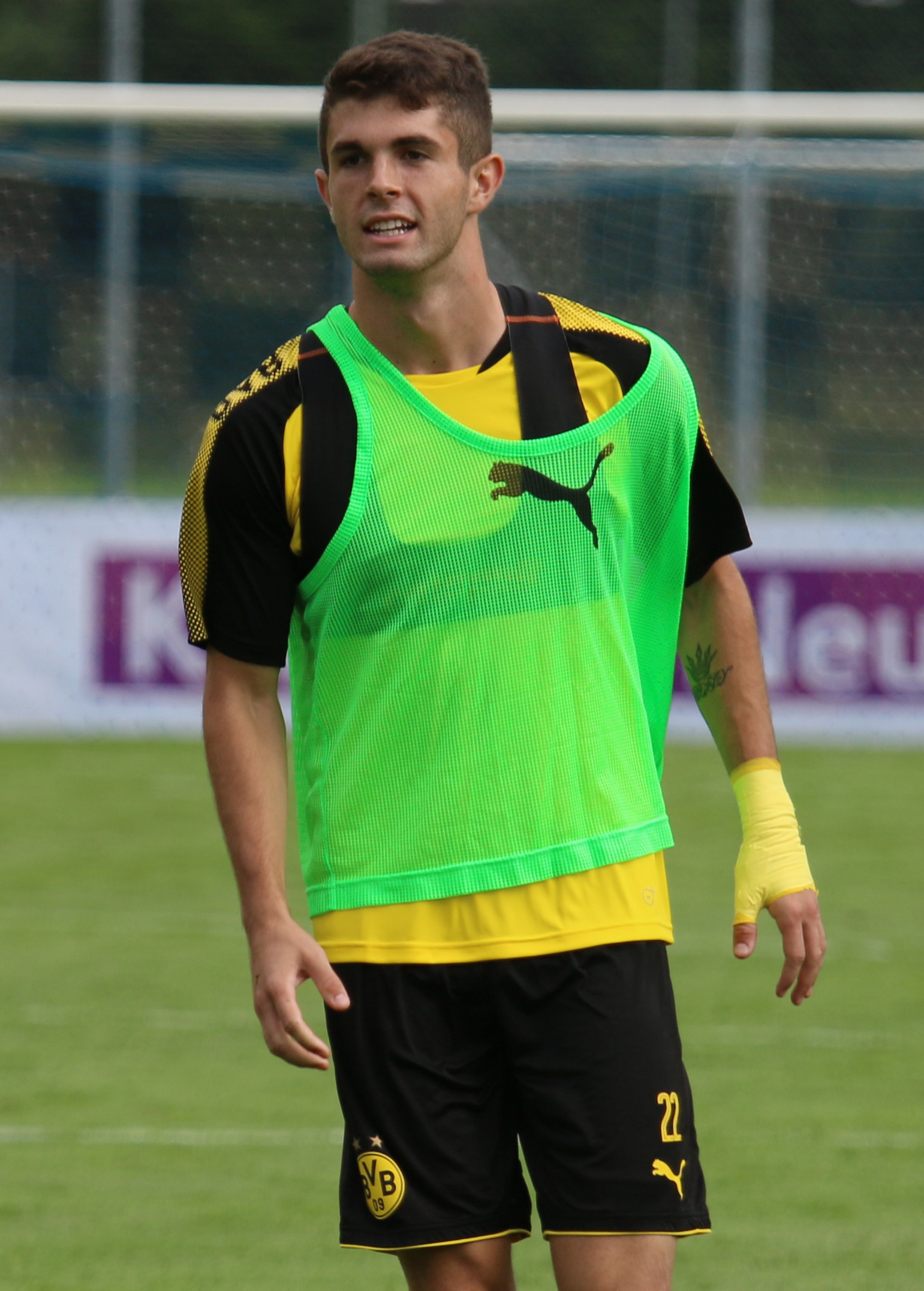 Christian Pulisic im BVB Trainingslager in Bad Ragaz 2017